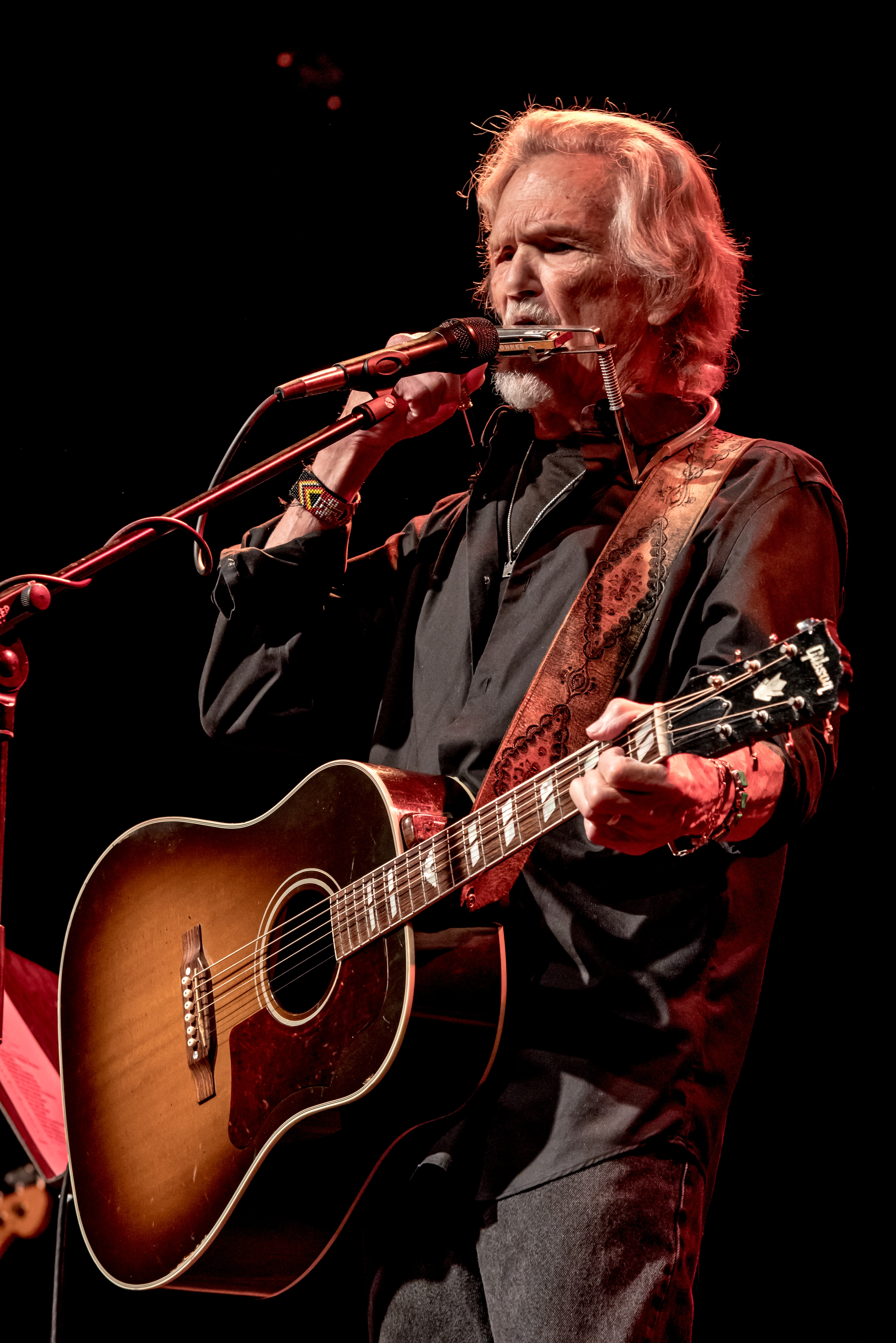 Bilder vom Zelt Musik Festival 2017 in Freiburg im Breisgau Kris Kristofferson